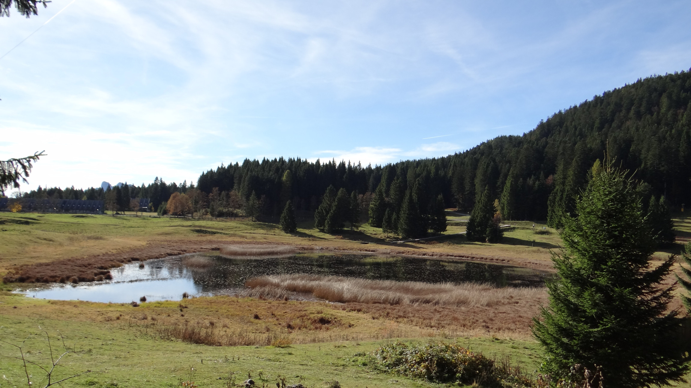 Palu' di Monte Rovere (Q49967123)